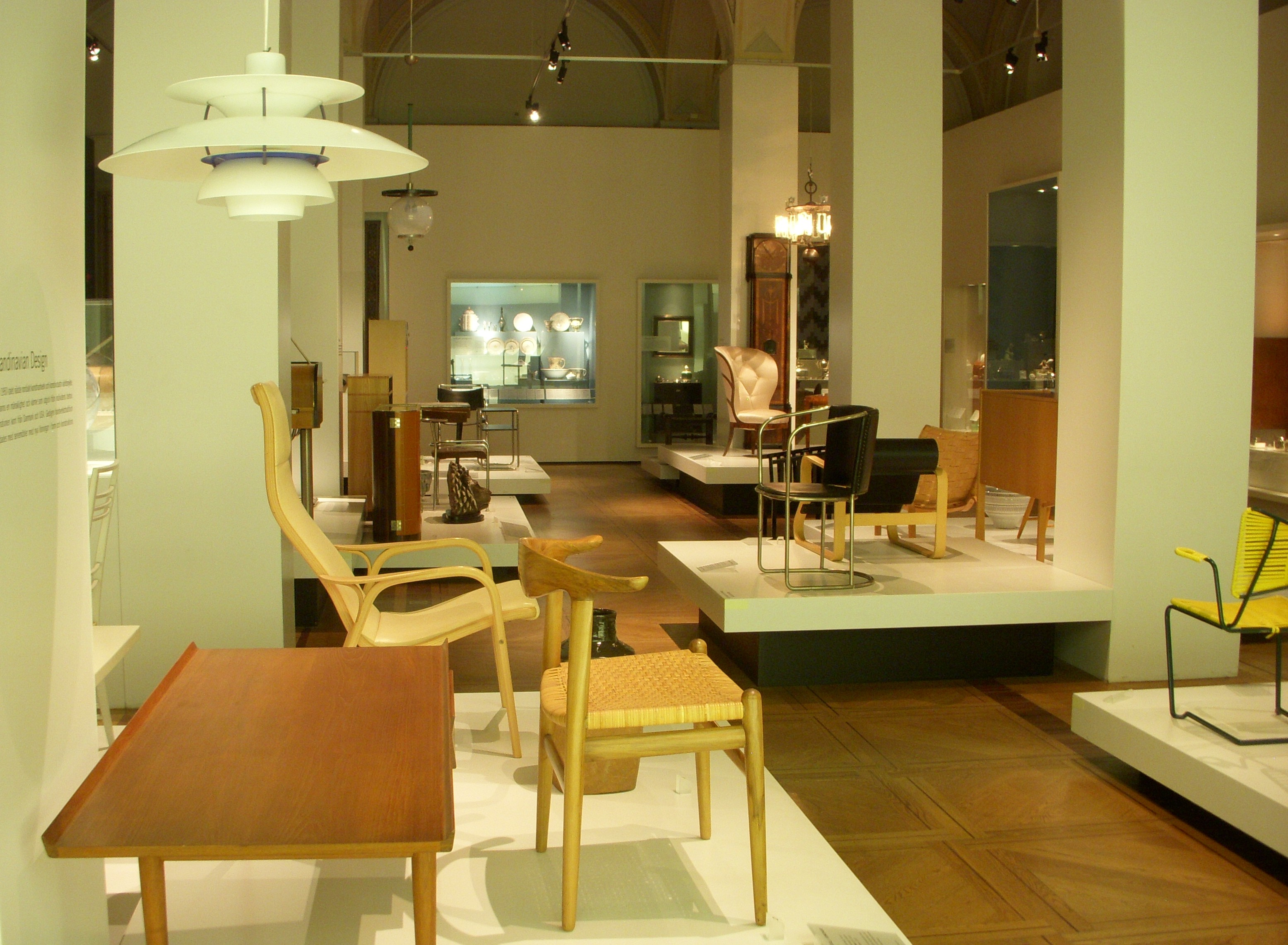 Nationalmuseum, avdelning "Modern form"